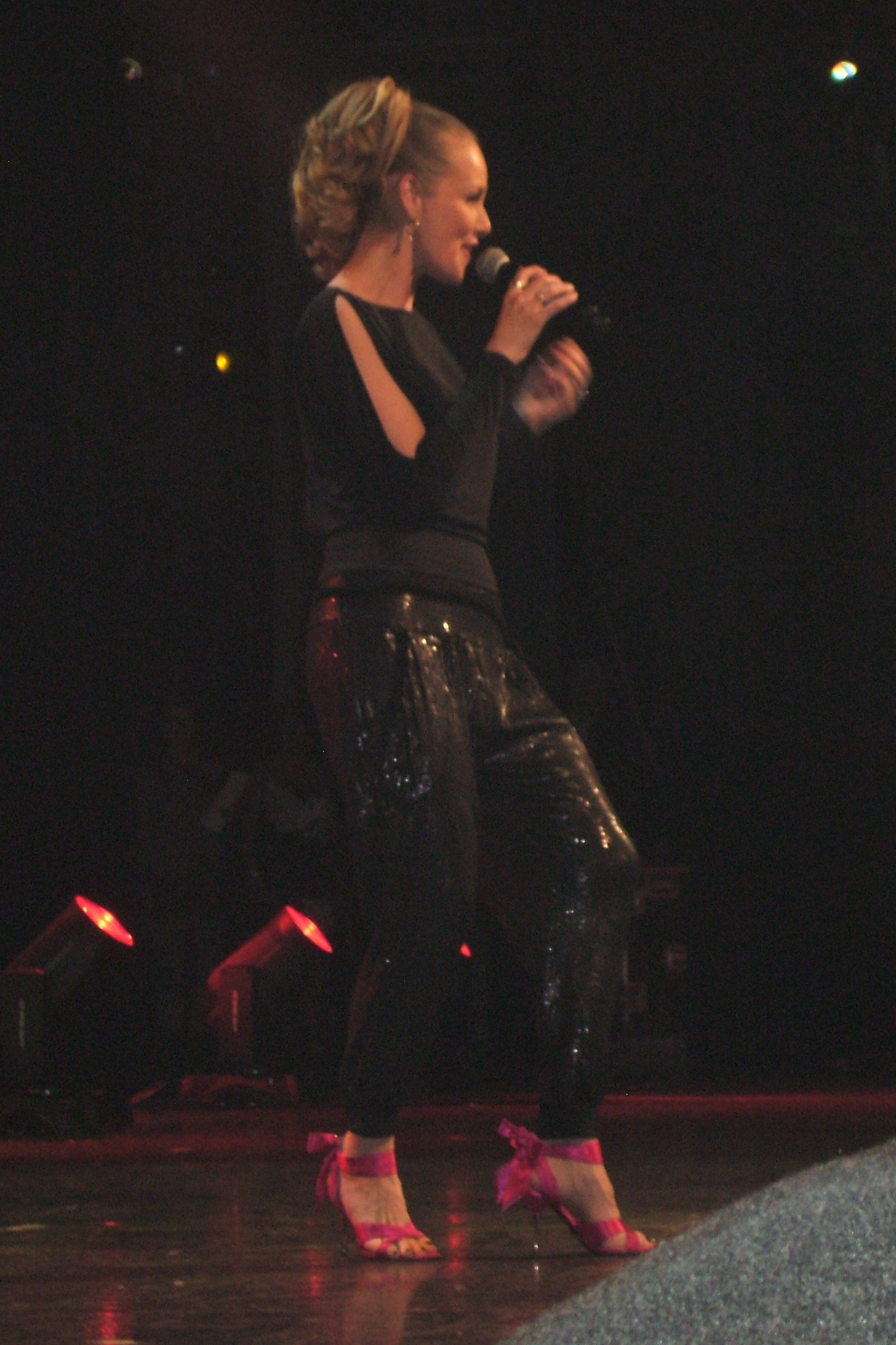 Pauzenummer tijdens het Nationaal Songfestival 2011 Marlayne